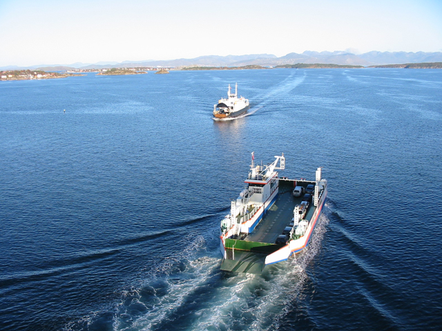 Rogaland. Foto: Omar Olsen